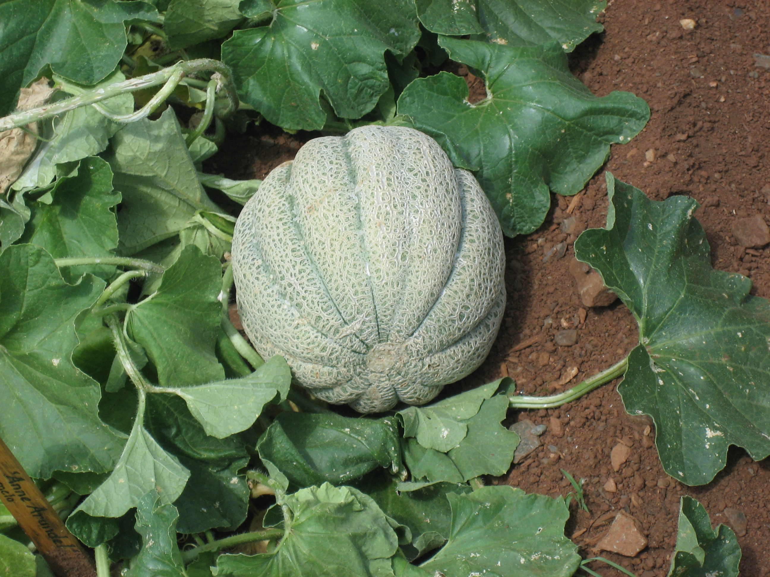 Isang milong musko.